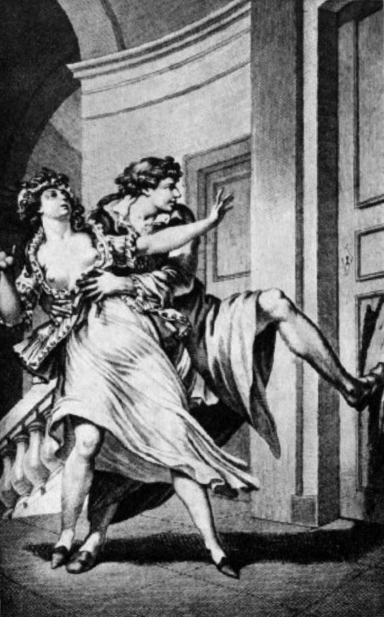 Illustration of Pierre Choderlos de Laclos' Dangerous Liaisons’ Letter 71 Valmont enfonçant la porte de la Vicomtesse